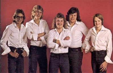 Tonnys Orkester 1975